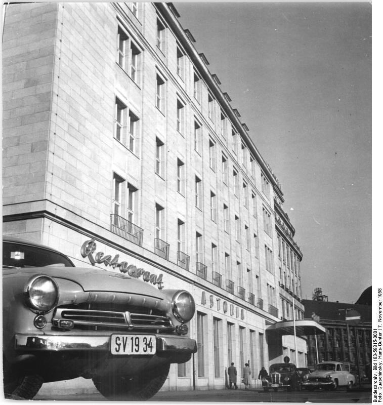 Leipzig, Hotel "Astoria" Zentralbild Quasch. 7.11.1958 Zur Vorbereitung der Wahl: Modernes Hotel entstand in Leipzig Zur Herbstmesse 1958 wurde am 13.8.1958 der neue Bauabschnitt des Hotels "Astoria" der Öffentlichkeit übergeben. Das Hotel das im 2. Weltkriege schwer beschädigt wurde und nach seiner Eröffnung 1945 mit ca. 80 Betten begann, besitzt damit jetzt eine Kapazität von 44 Betten. Es zählt auf Grund seiner neuzeitlichen Inneneinrichtung zu den schönsten unerer Republik. Ein weiterer Bauabschnitt, der im Herbst 1959 abgeschlossen sein wird, erhöht die Bettenzahl auf rund 480. UBz: Blick auf den neuen Bauabschnitt des Hotels.